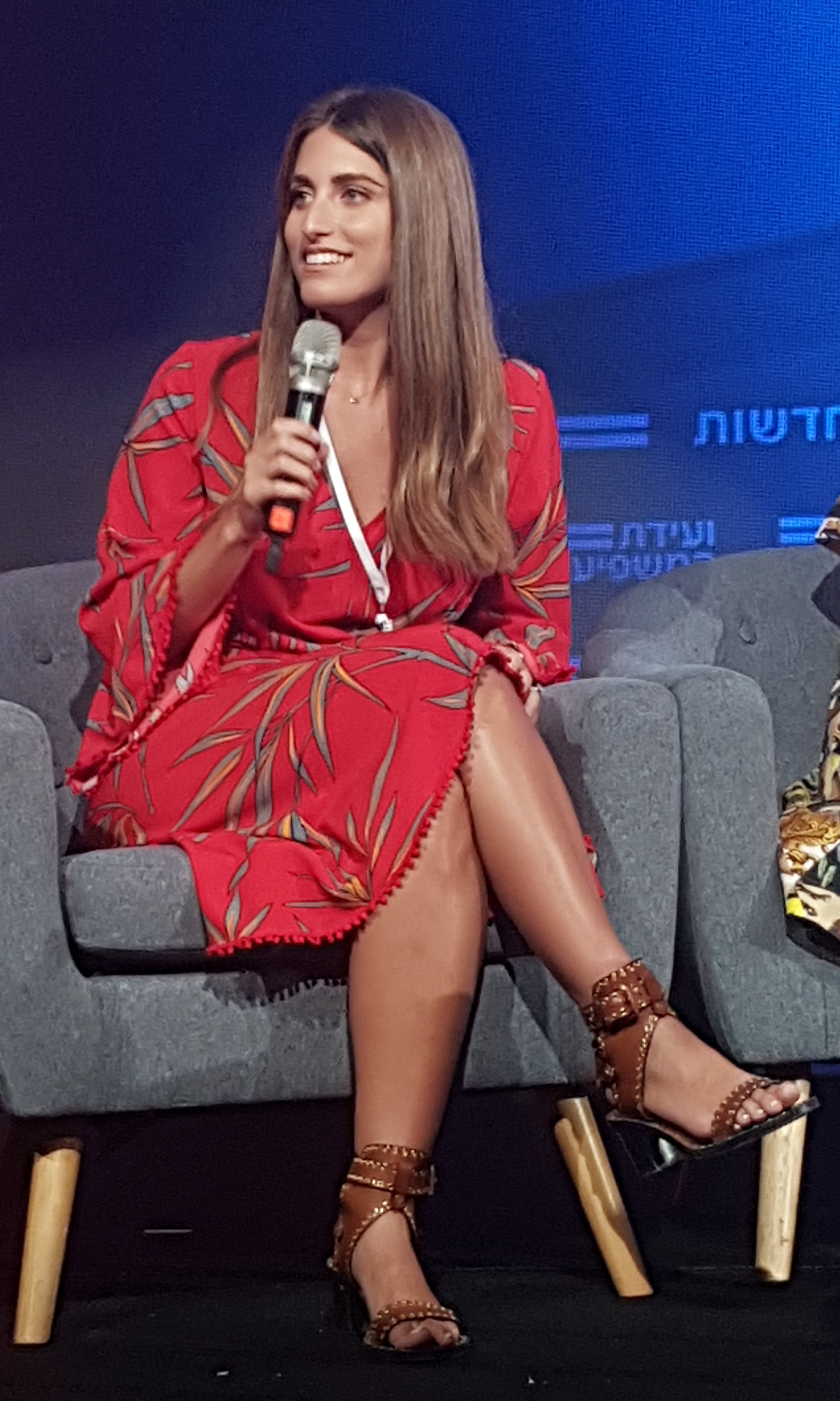 Dana Zarmon